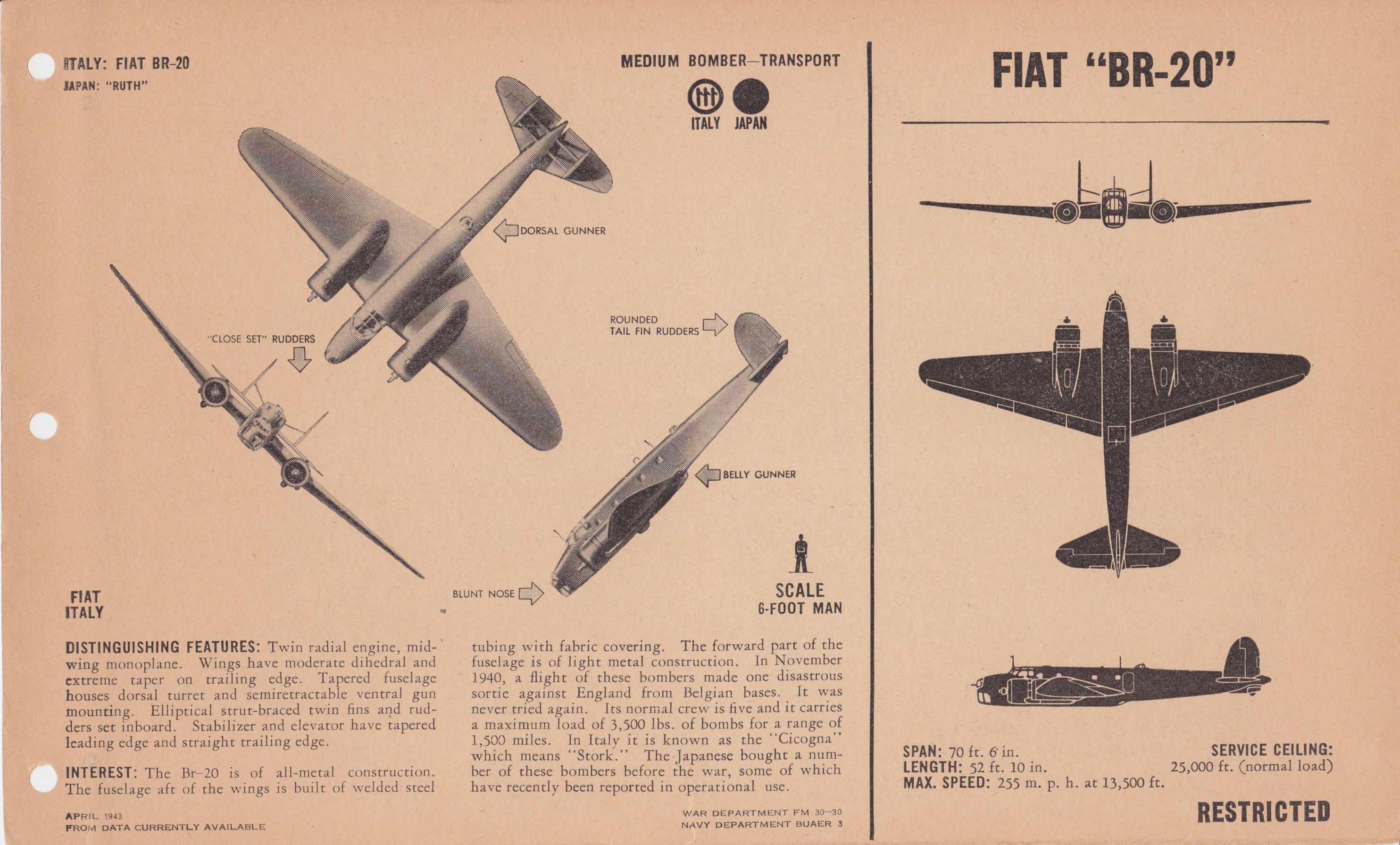 FIAT "BR-20"